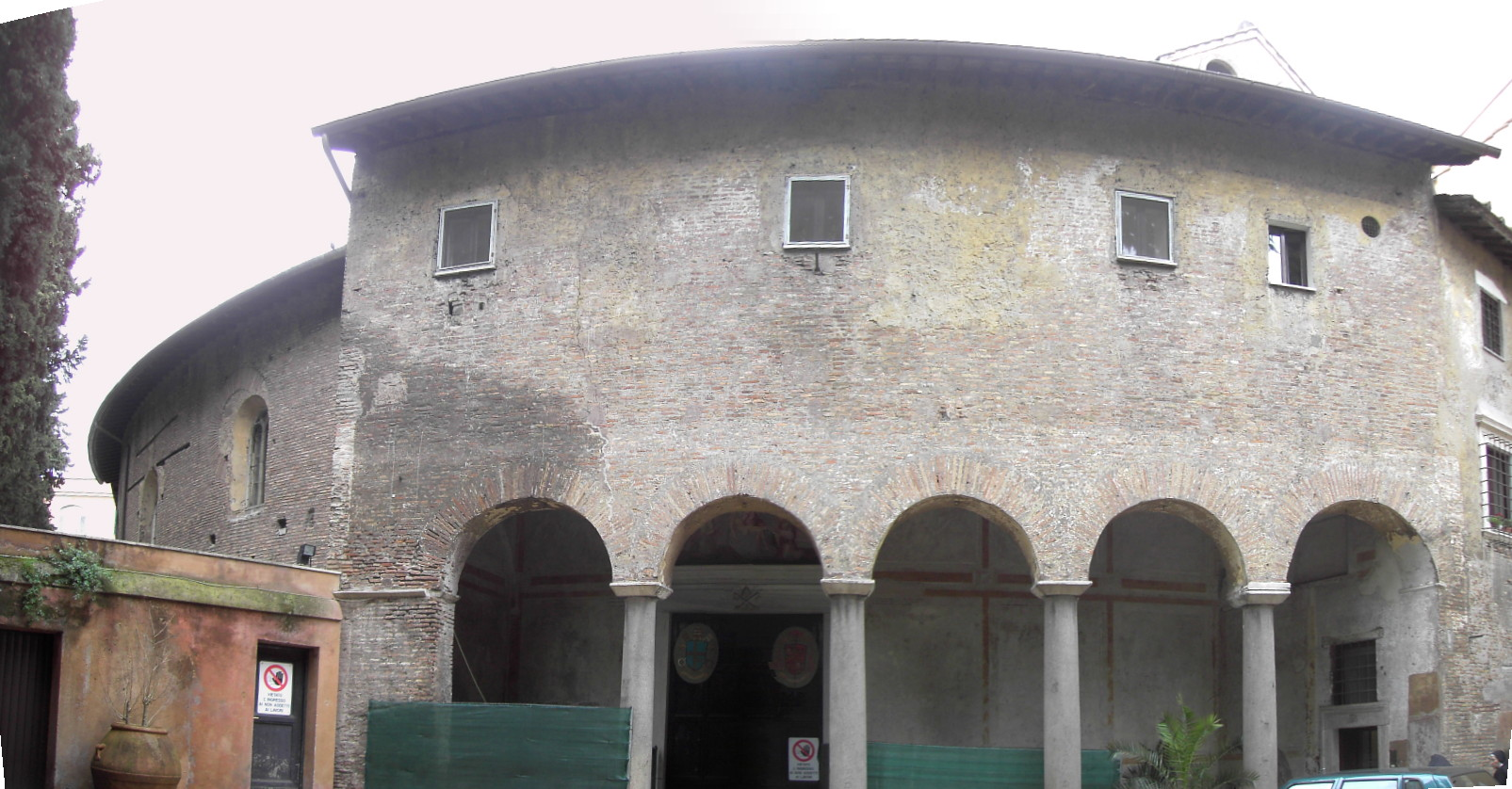 Roma, santo Stefano rotondo, facciata.